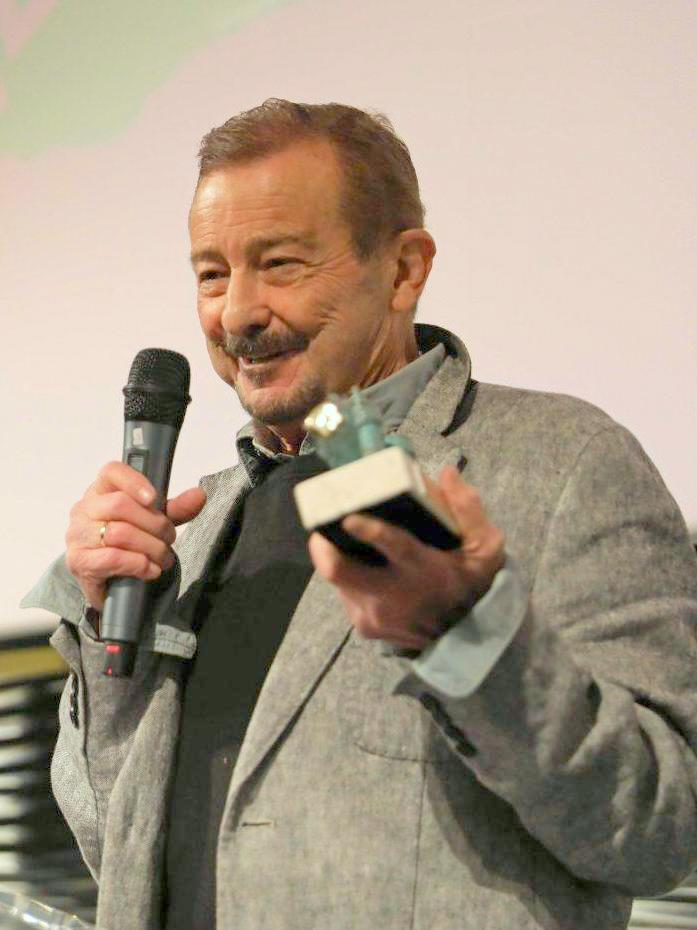 El actor Juan Diego será galardonado con el Premio Puente de Toledo. Asimismo la actriz Pilar Bardem recibirá una mención especial por su trayectoria y su apoyo al cine de nuestro país.También se celebrará el 28º Festival de Cortos, uno de los certámenes mejor dotados a nivel nacional y “La Noche Más Corta” , una iniciativa que permite a los jóvenes creadores compartir su trabajo